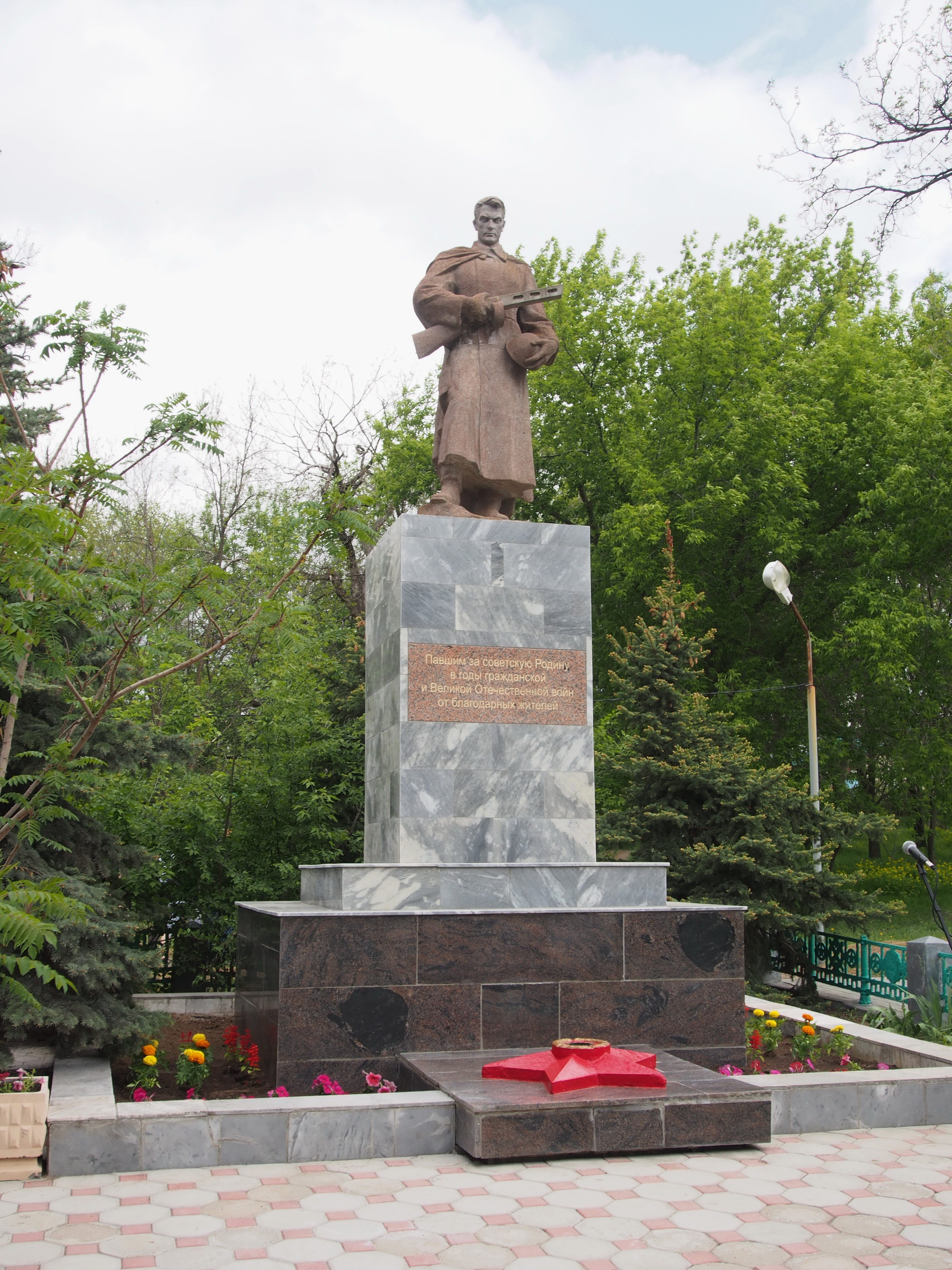 Памятник павшим за Советскую Родину в годы Гражданской и Великой Отечественной войн от благодарных жителей., Дубовка, Волгоградская область